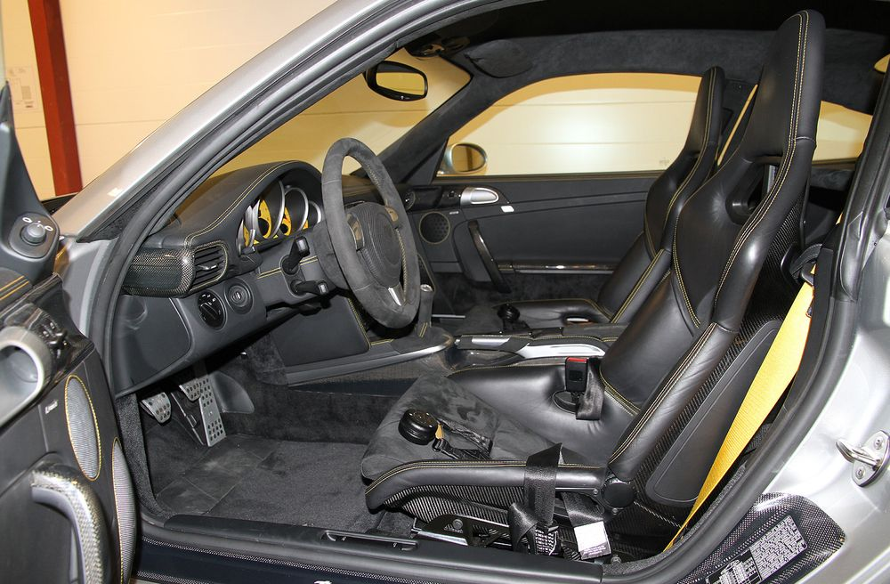 2008 Porsche 911 997 Turbo RUF RT 12